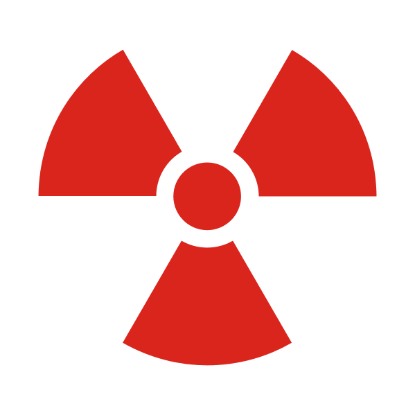 Símbolo de radiación. Zona de acceso prohibido. Según legislación española (que transpone las directivas europeas, que a su vez recoge las recomendaciones internacionales) Apéndice 4: Señalización de zonas, Real Decreto 1753/1987, Apéndice 4: Señalización de zonas, punto 3, Real Decreto 53/1992 y la legislación vigente en España Anexo IV: Señalización de zonas, punto 5 Real Decreto 783/2001.